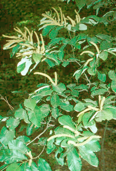 Allegheny Chinkapin Castanea pumila